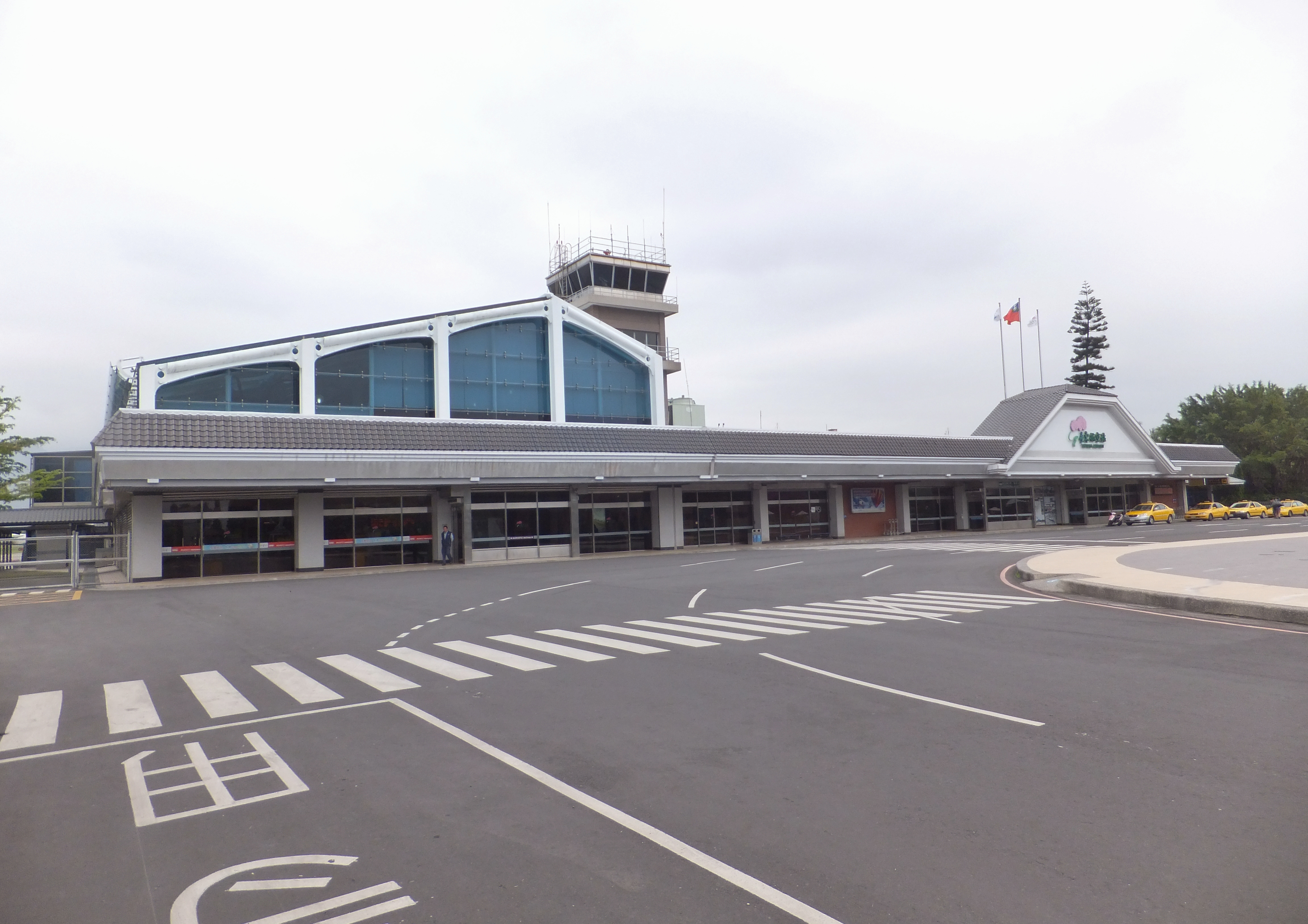 由東南方遠望臺東機場航站。